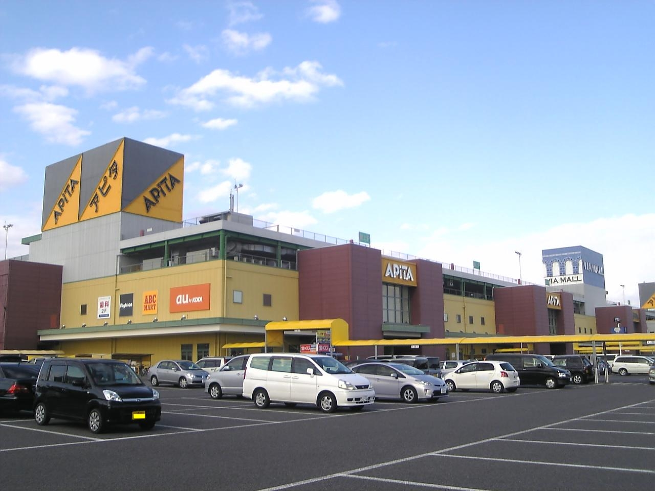 アピタ江南西店舗外観1